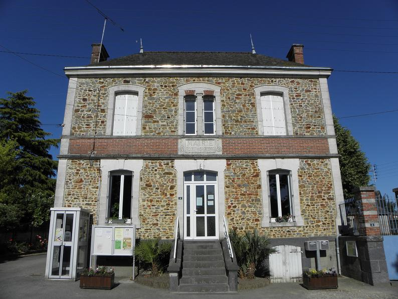 Mairie de Brains-sur-les-Marches (53).